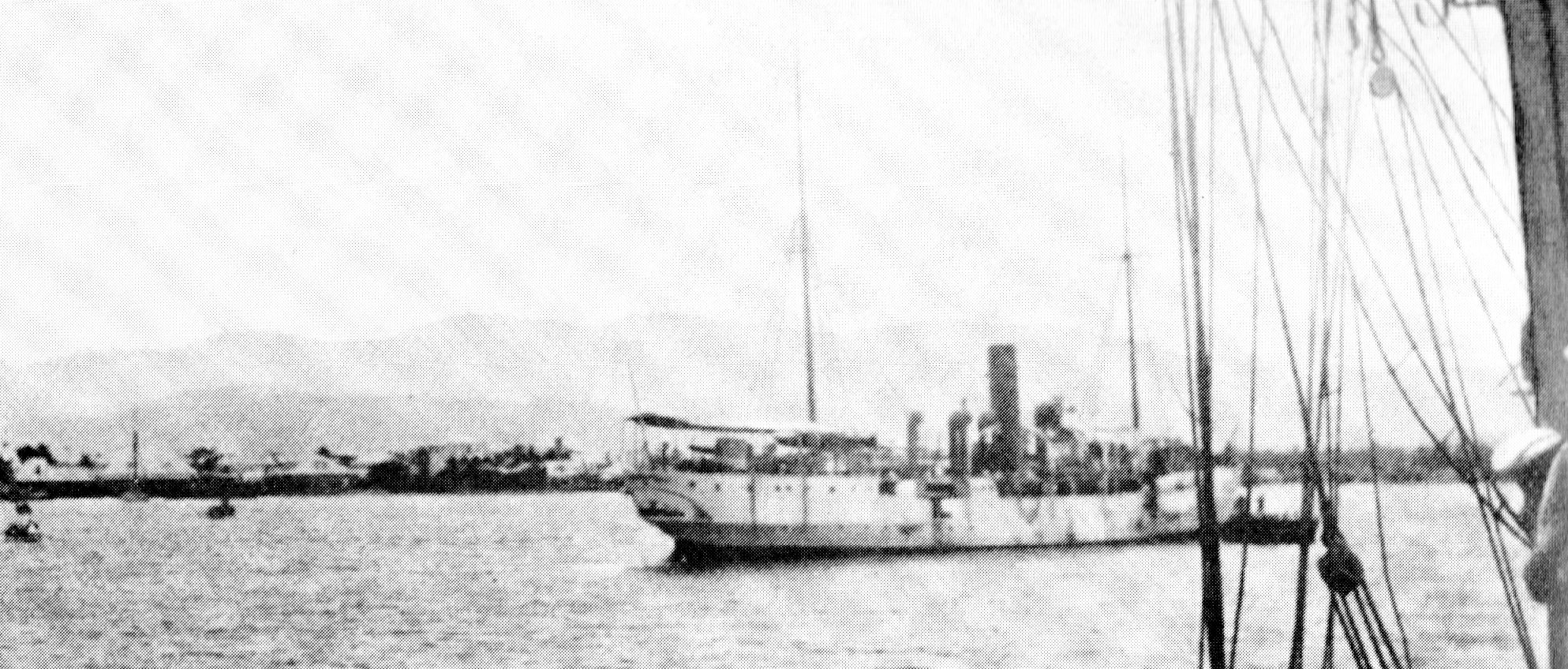 Haitianisches Kanonenboot "Crête-à-Pierrot" am 6. September 1902 im Hafen von LA GONAIVES kurz vor der Versenkung durch SMS "Panther". Aufnahme von Bord der "Panther", abgedruckt in der "Marine-Rundschau" Jahrgang 1902